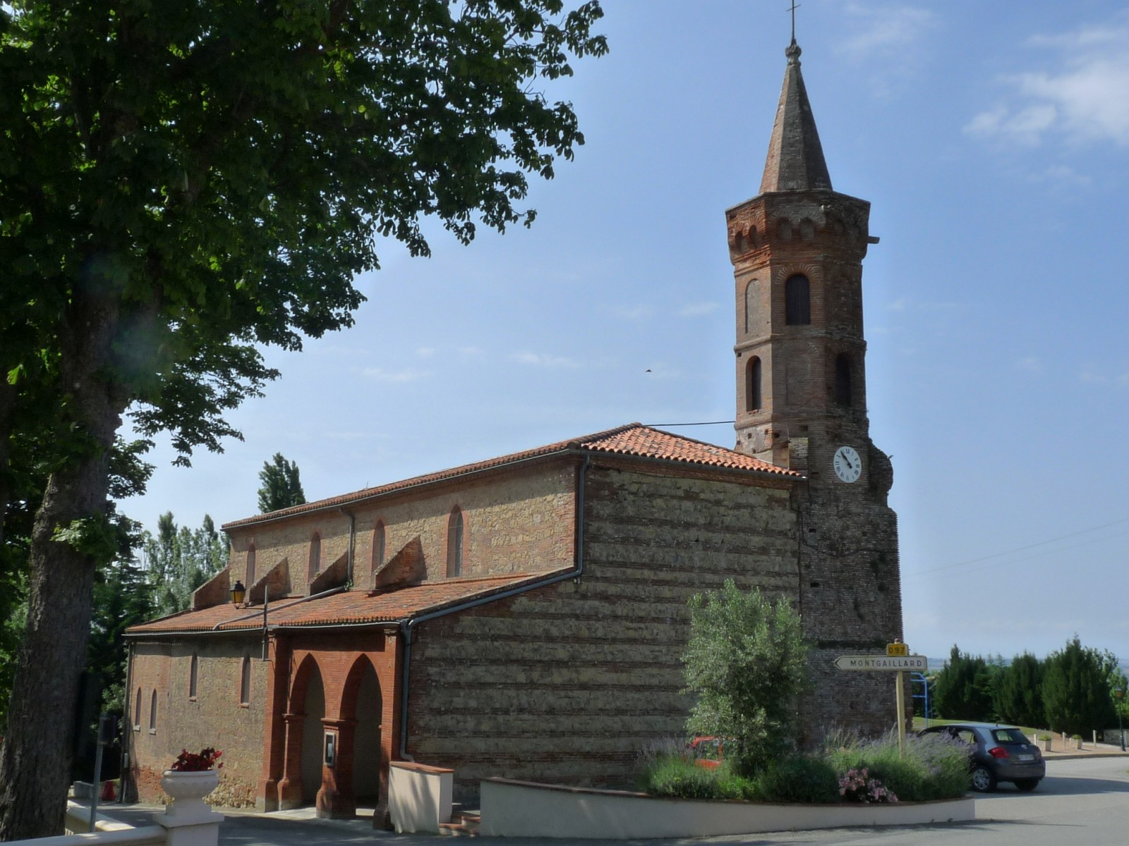 Eglise de Mauremont, Haute-Garonne, France